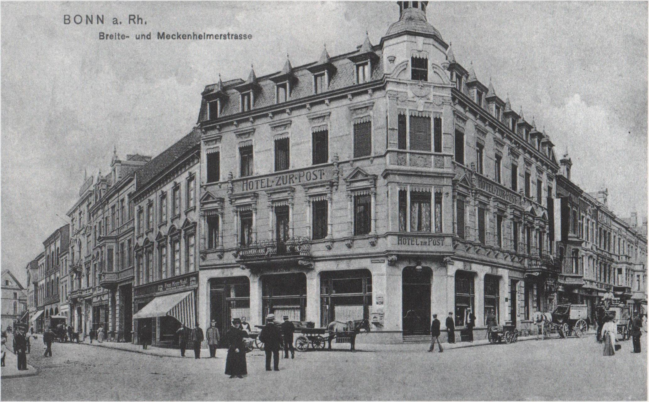 Ecke Meckenheimer Straße (heute Berliner Platz)/Breite Straße, Bonn; am linken Bildrand das Eckhaus Meckenheimer Straße/Bornheimer Straße (heute Thomas-Mann-Straße/Berliner Platz)